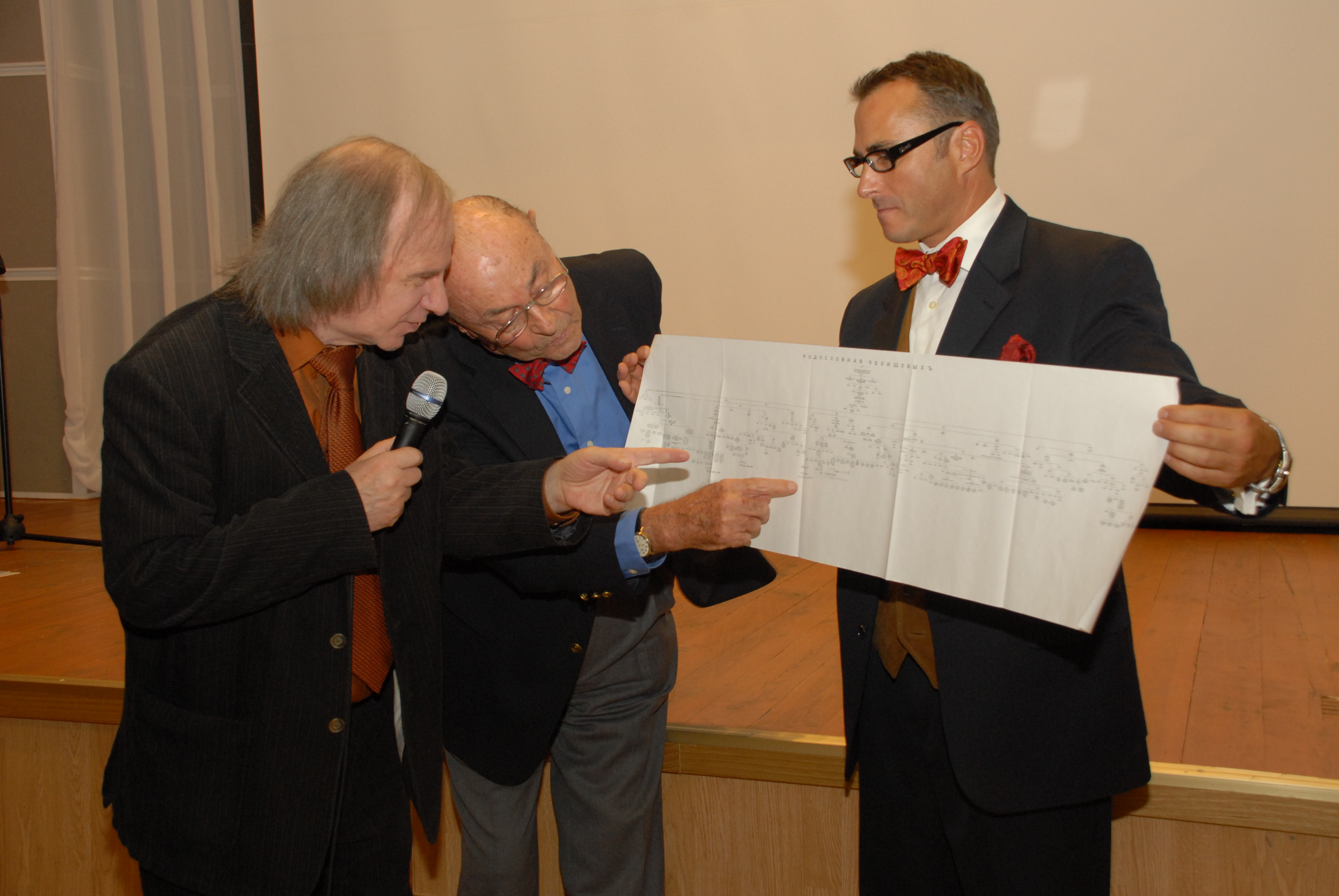 Viktor Chelichev pokazivaet mne (Konstantinu Kedrovu) moe mesto v 25-om pokolenii roda Chelichevih